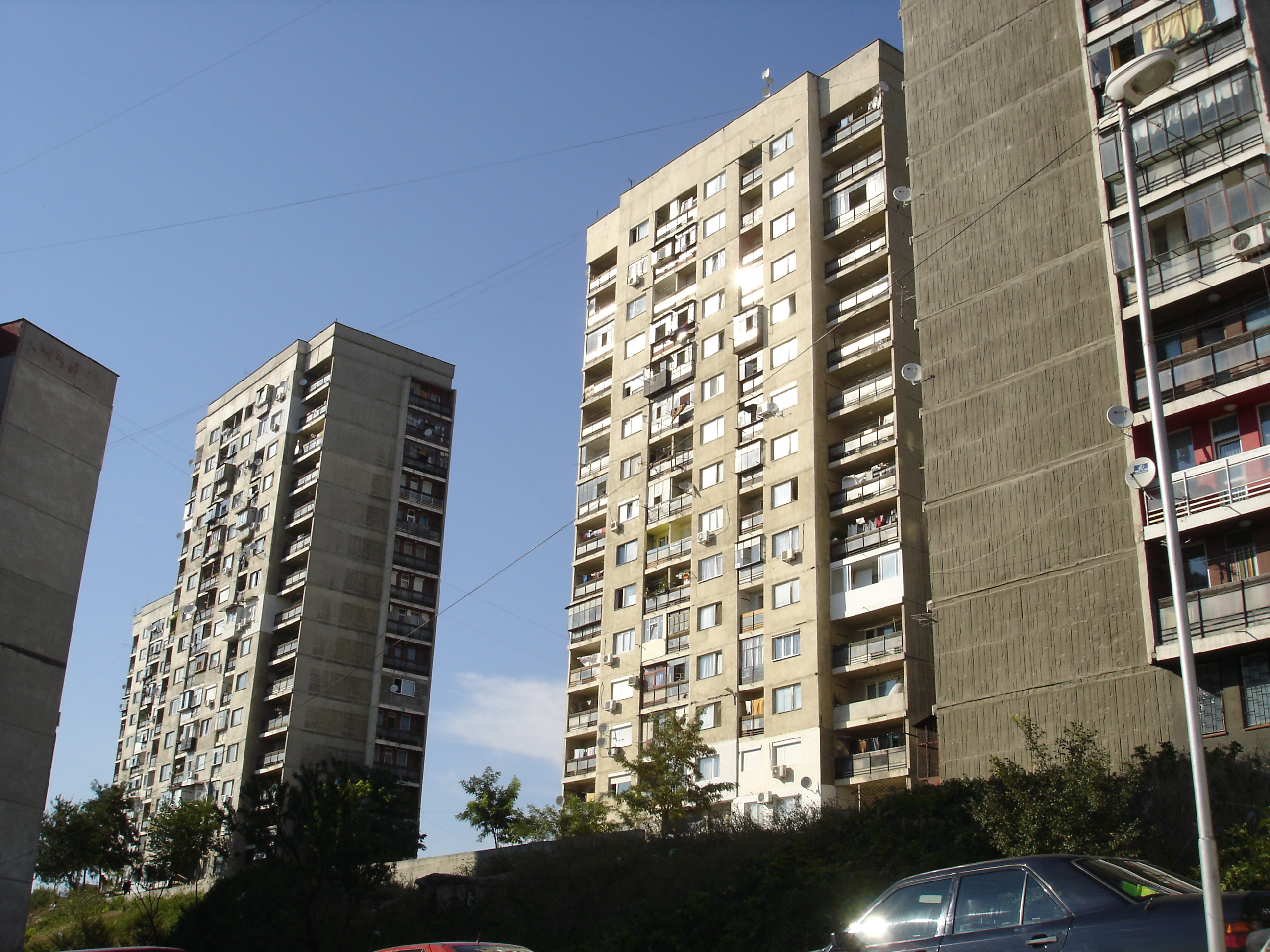 Quarter Vladislavovo, Varna